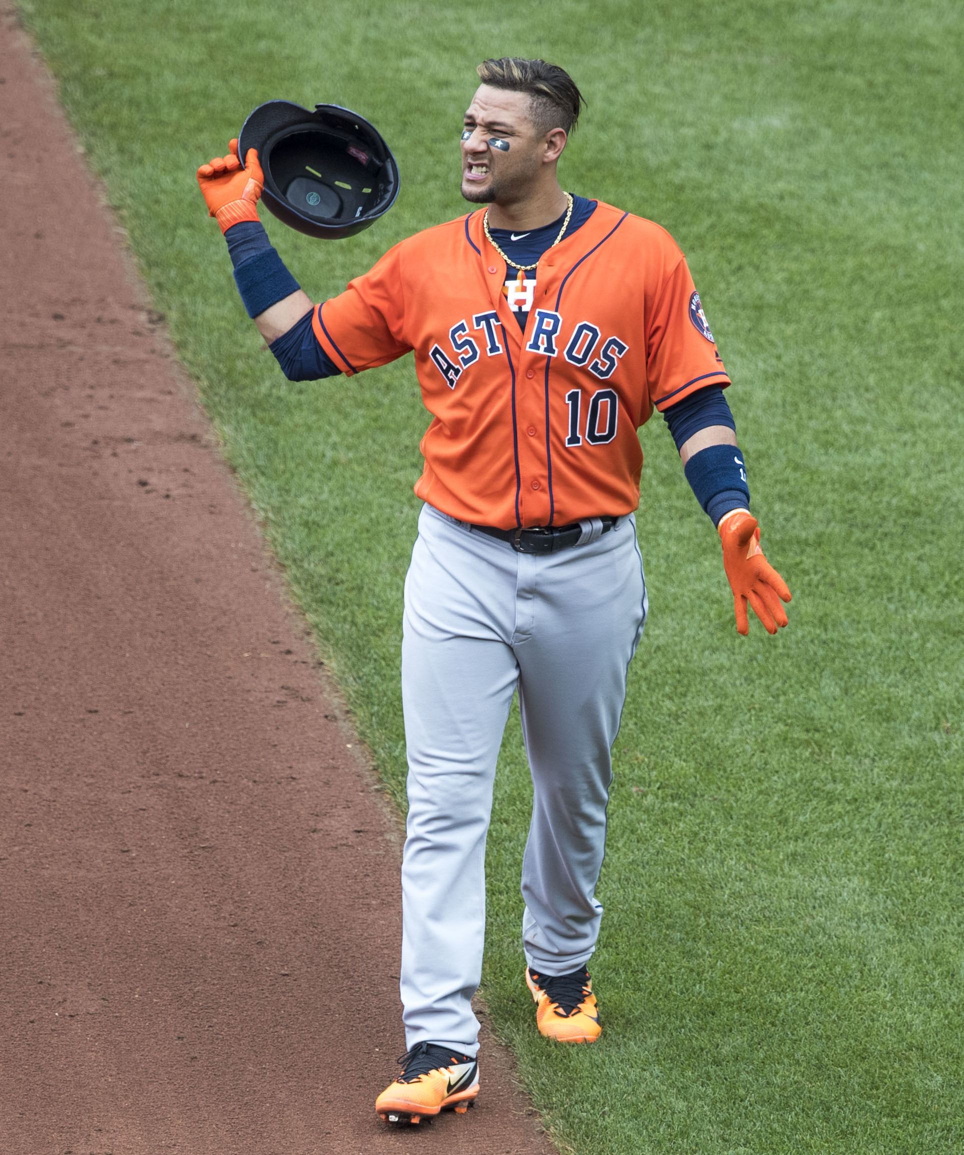 Astros at Orioles 7/23/17